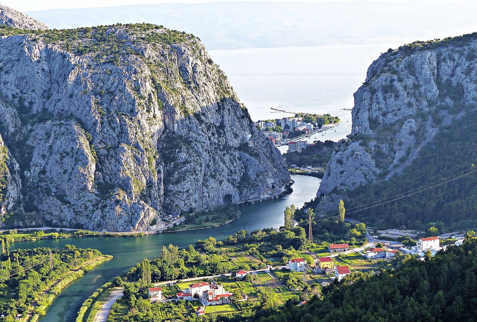 Der Einfluss der Cetina in die Adria bei Omis